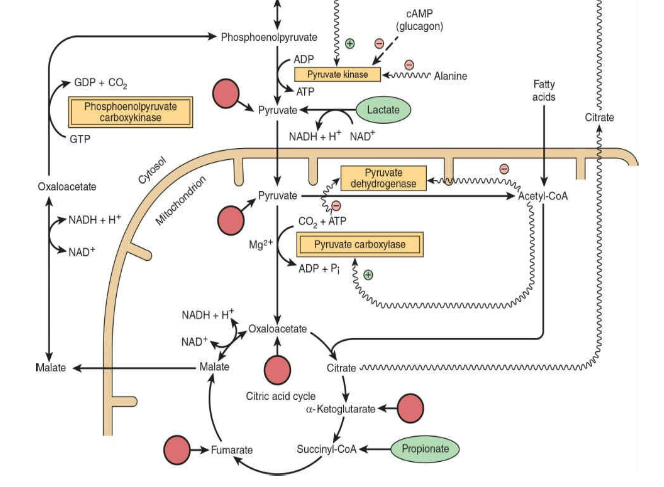 Цикъл на Трикарбоксиловите киселини